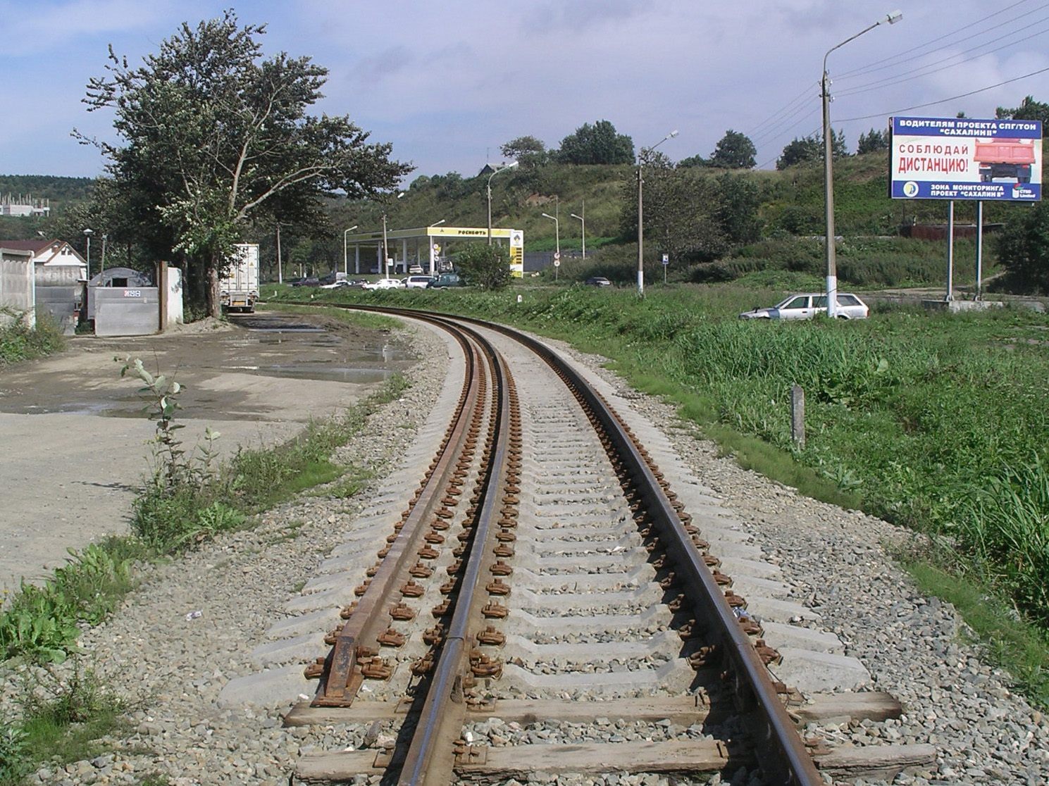 日本時代の1067ｍｍから、ロシアの1520ｍｍへ改軌がすすむ、樺太の鉄道。大泊駅付近。 投稿者撮影 ---敷香 2007年5月7日 (月) 14:34 (UTC)